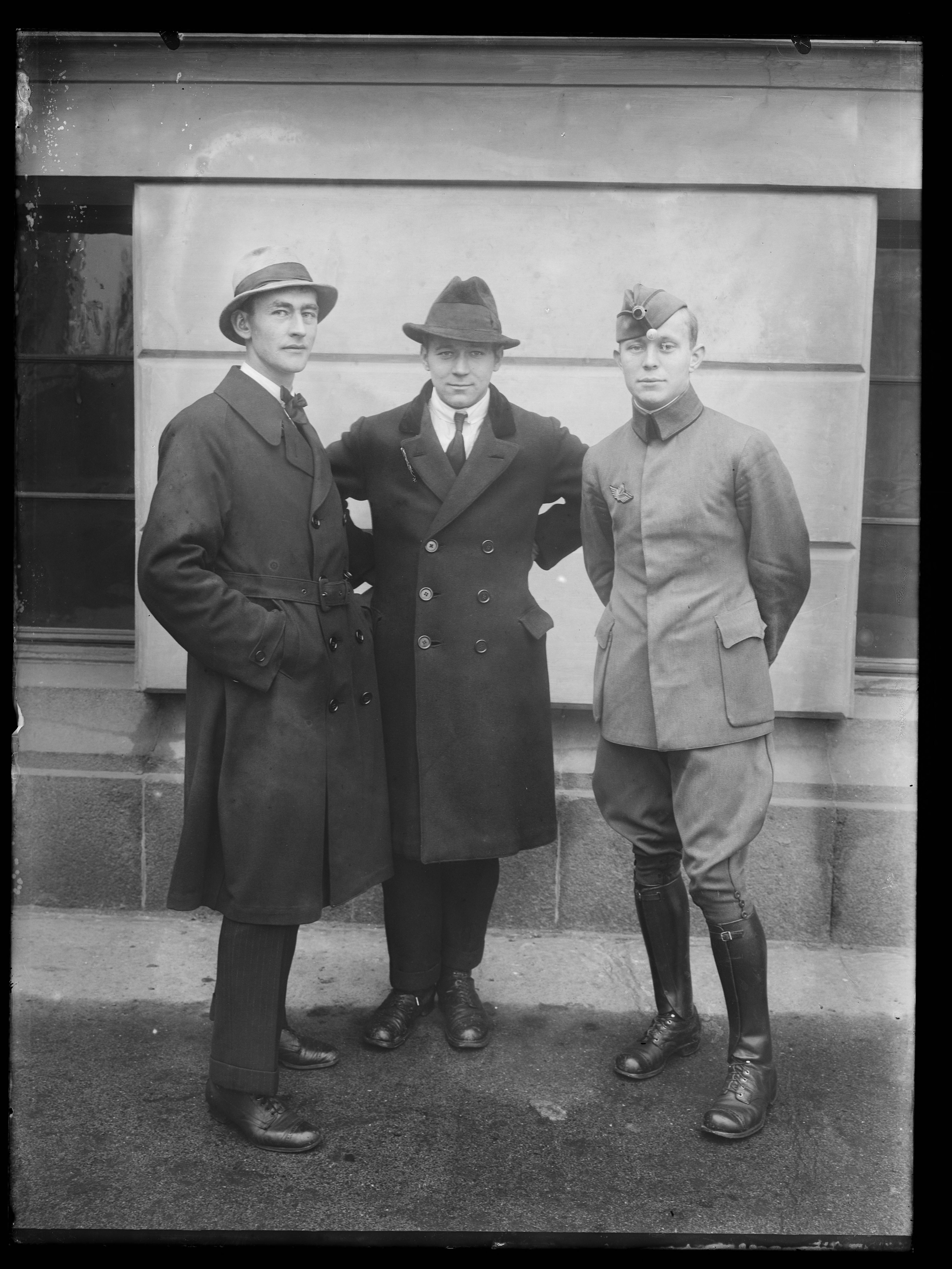 Bildet er hentet fra Nasjonalbibliotekets bildesamling. Anmerkninger til bildet var: Påskrift arkivark: Nordpolsfarerne Eldste arkivnummer: 621 Oslo, Oslo, Oslo